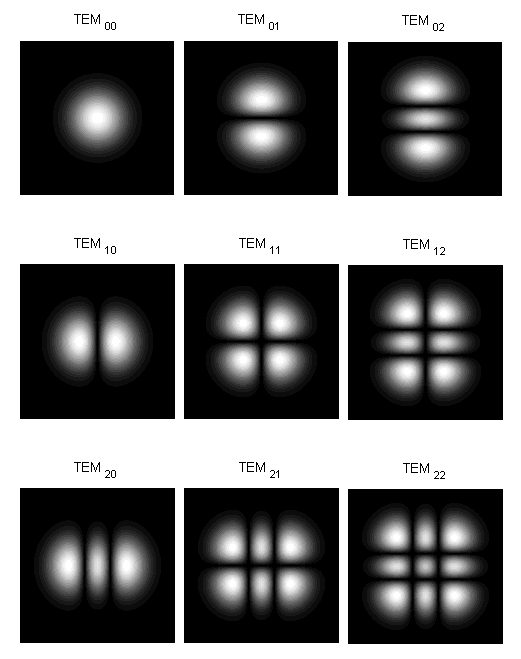 Transverse Electromagnetic Modes for a rectangular laser reflector